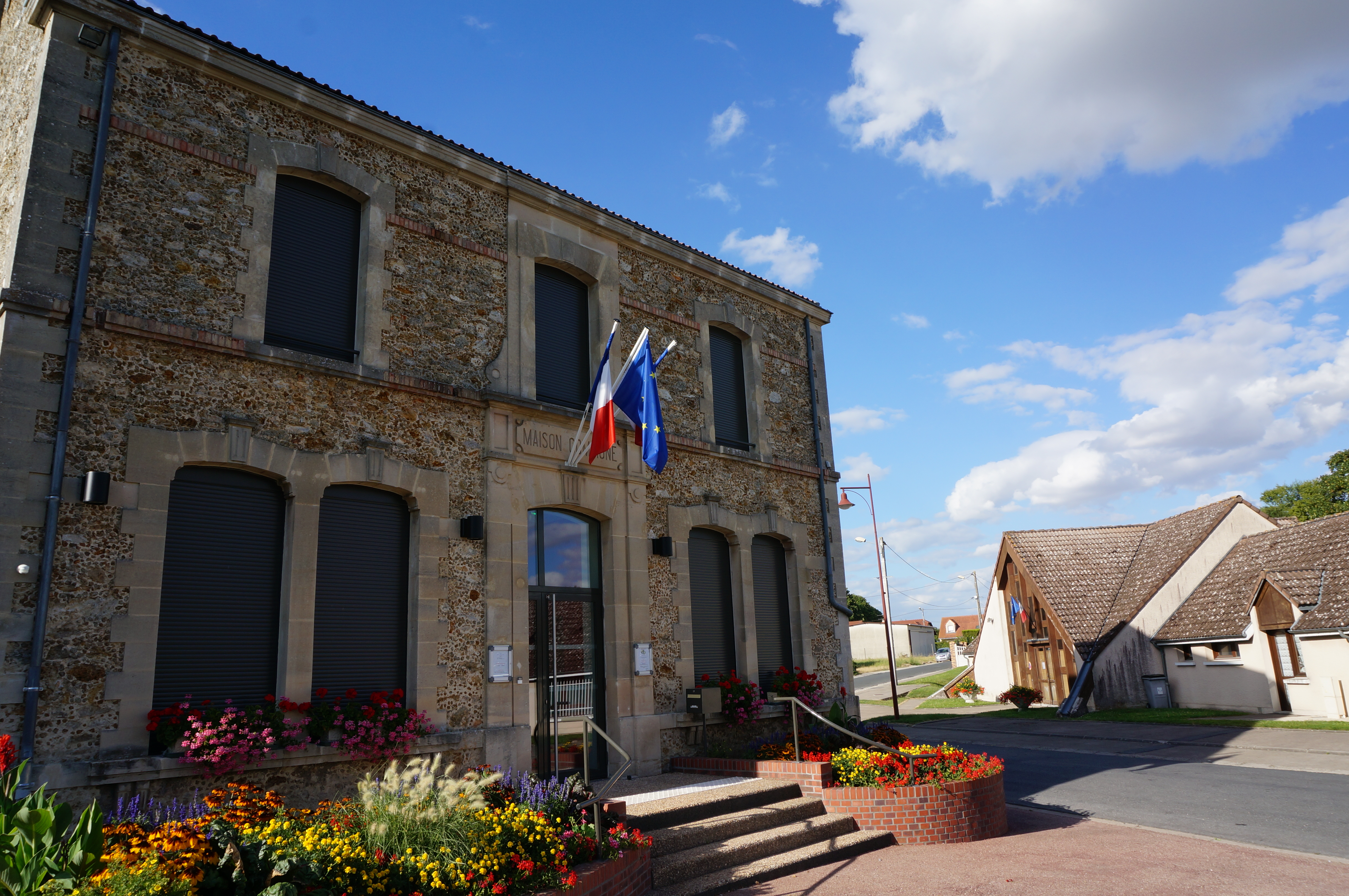 la mairie et l'école de Saint-Étienne-au-Temple.